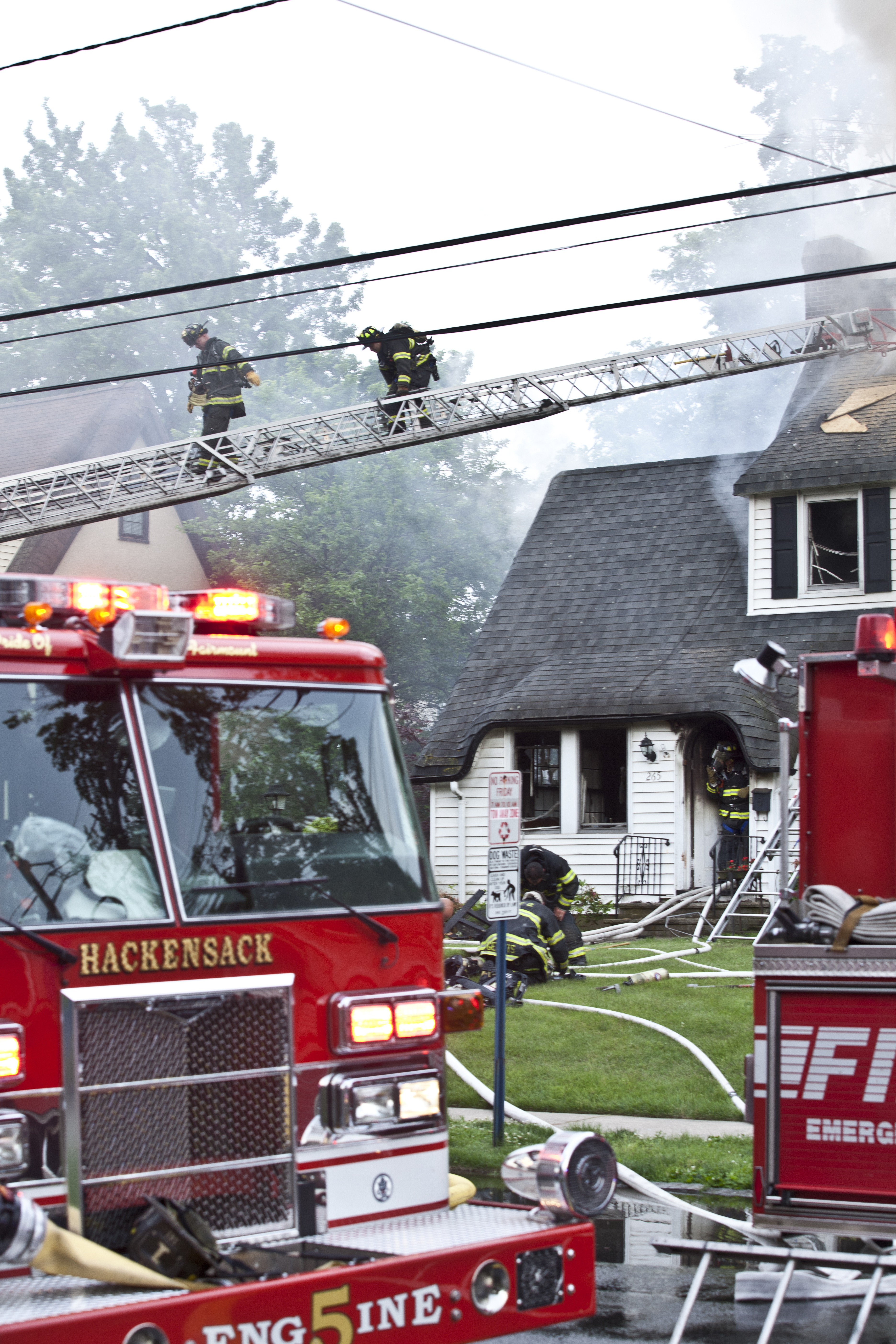 Hackensack Fire Department, Hackensack, New Jersey